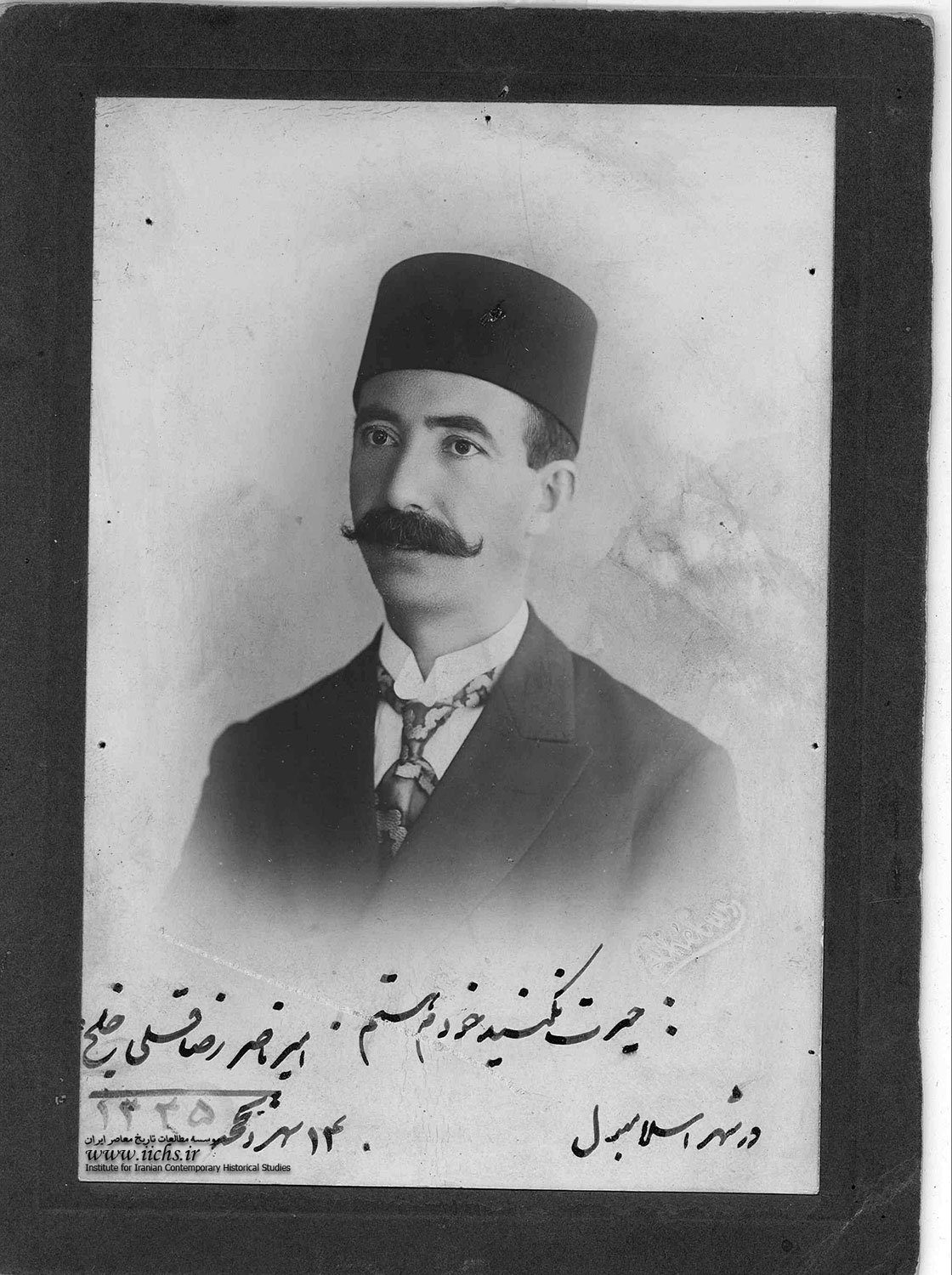 امیرناصر خلج - ۱۴ ذیحجه ۱۳۴۵ هجری قمری - ۲۳ خرداد ۱۳۰۶